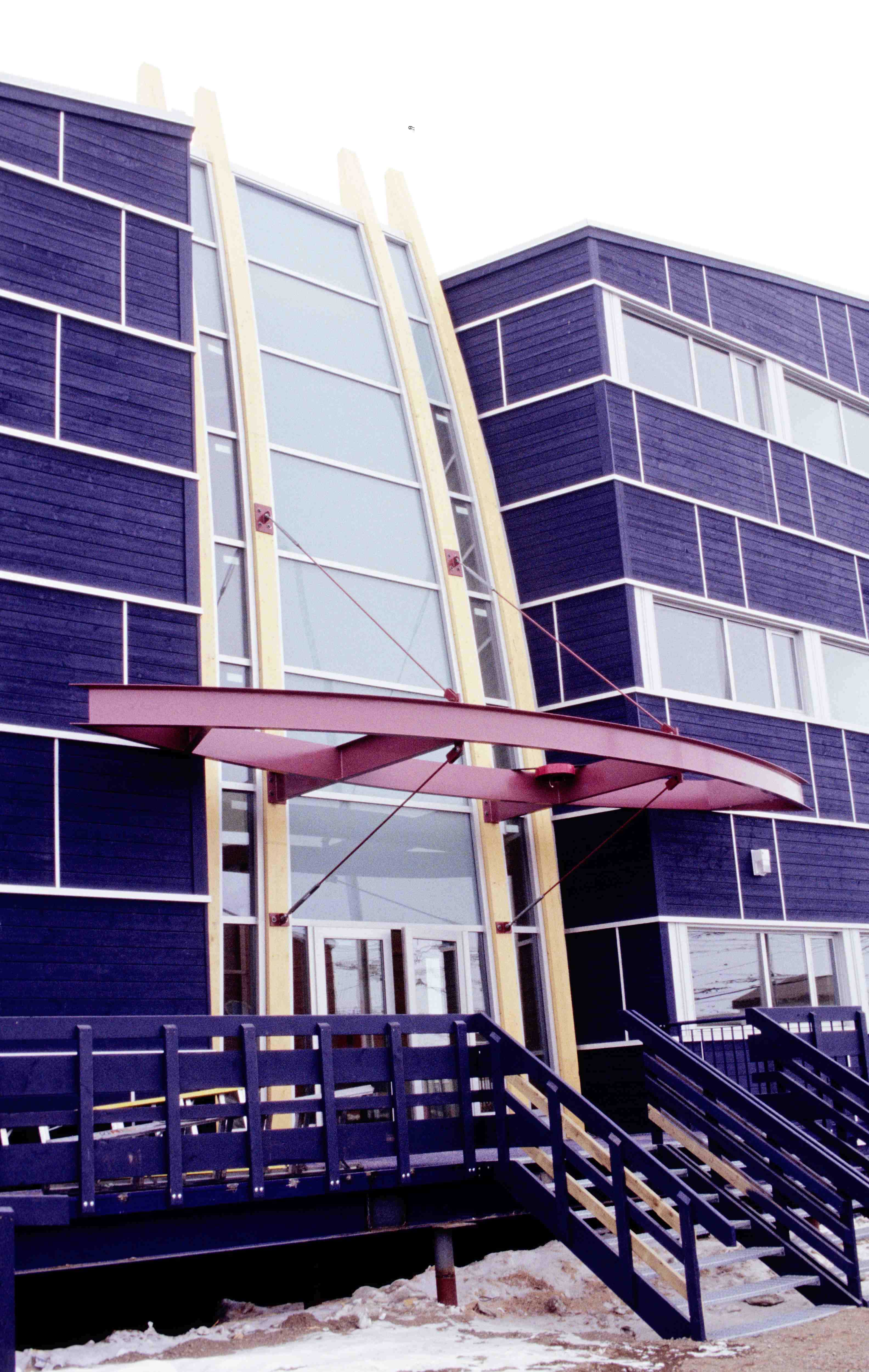 Iqaluit, Legislative Building (entrance)